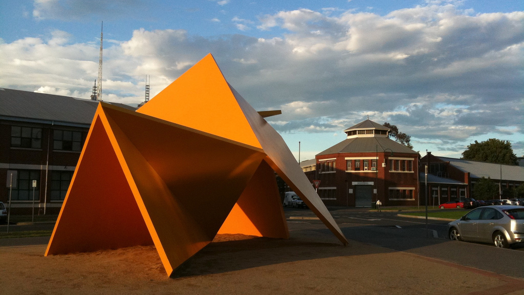 Ron Robertson-Swann's 'Vault'